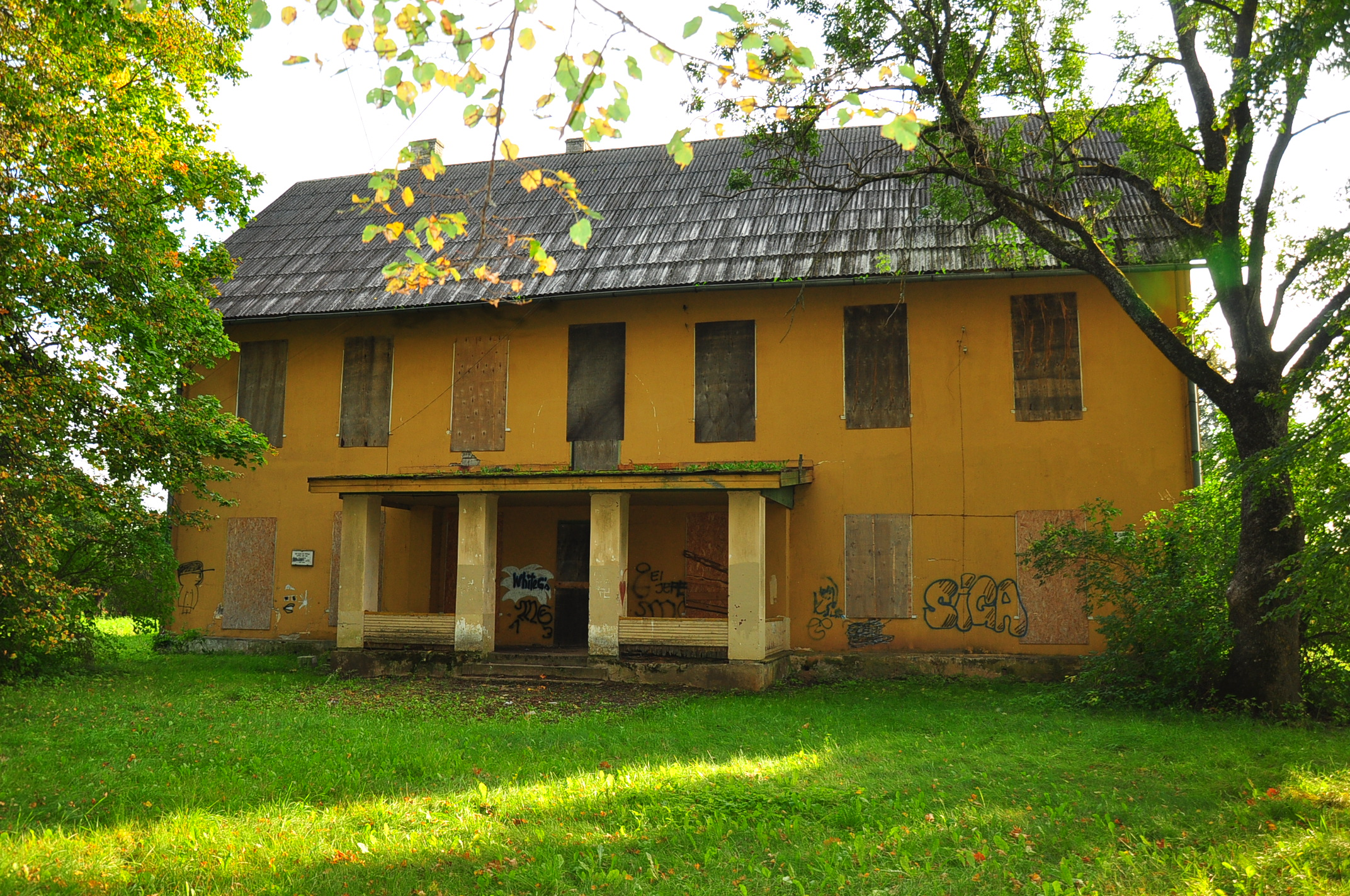 Nõo kihelkonnakooli hoone